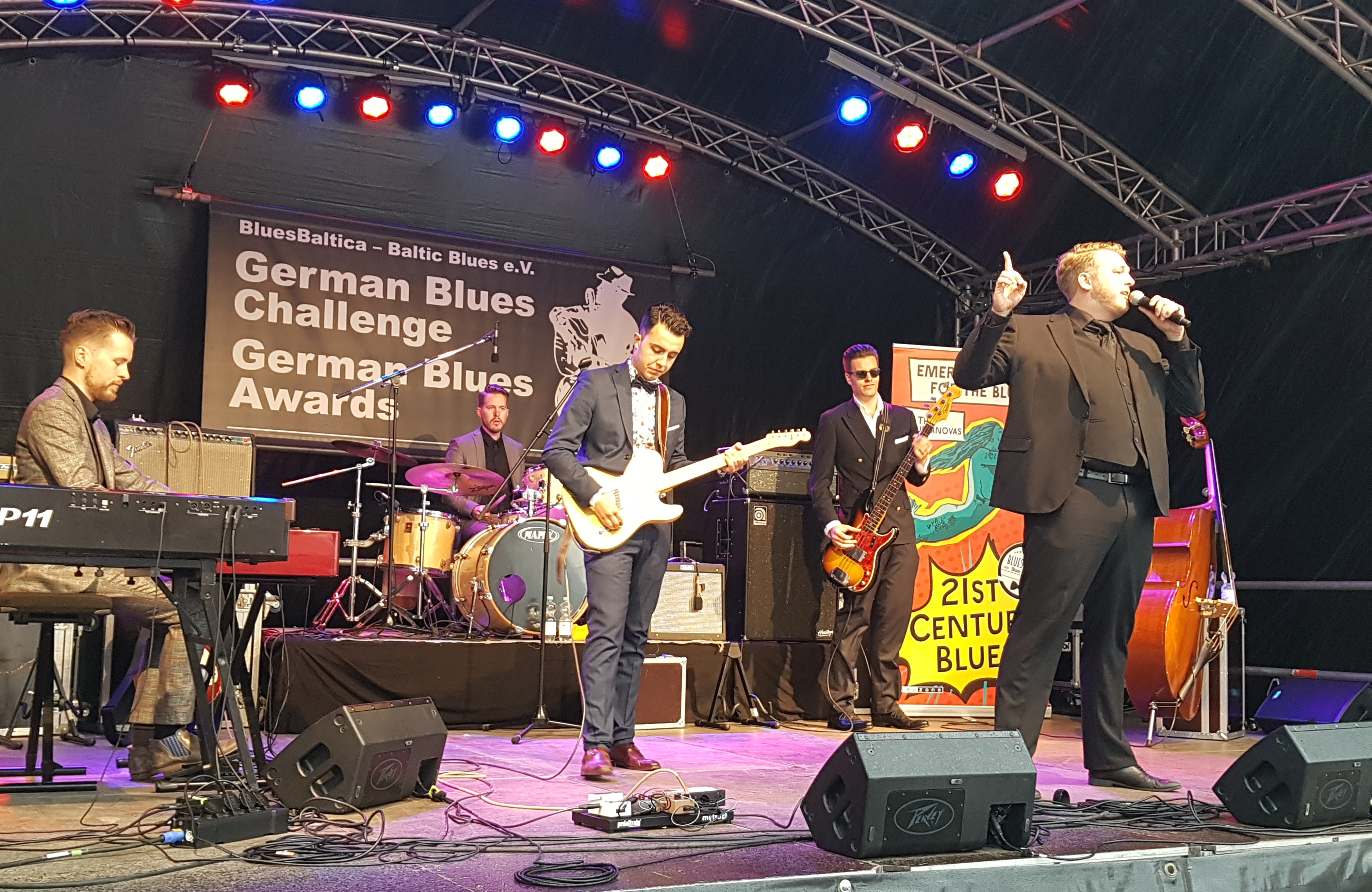 The Bluesanovas, Blues'n'Boogie-Band aus Münster (Westfalen), Gewinner der German Blues Challenge 2019, bei ihrem Gewinnerauftritt am 15. September 2019 auf der Bühne in Eutin. 2015 gegründet, Besetzung: Melvin Schulz (Gesang), Filipe de la Torre (Gitarre), Philipp Dreier (Schlagzeug), Nico Dreier (Klavier) und Nikolas Karolewizc (Bass)